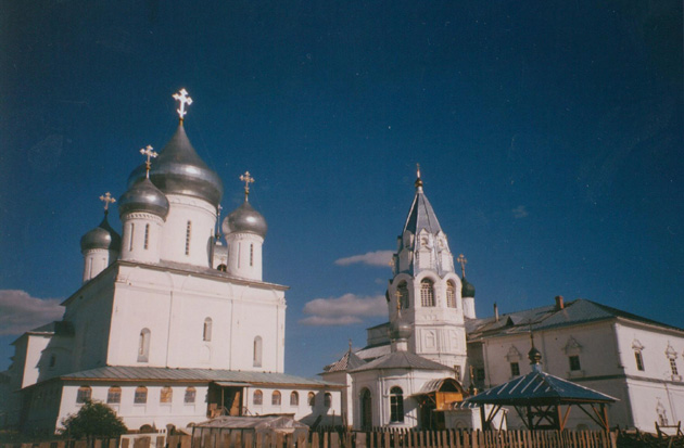 Pereslavl-Zalessky. Nikitsky Sobor. Nikitsky Sobor.